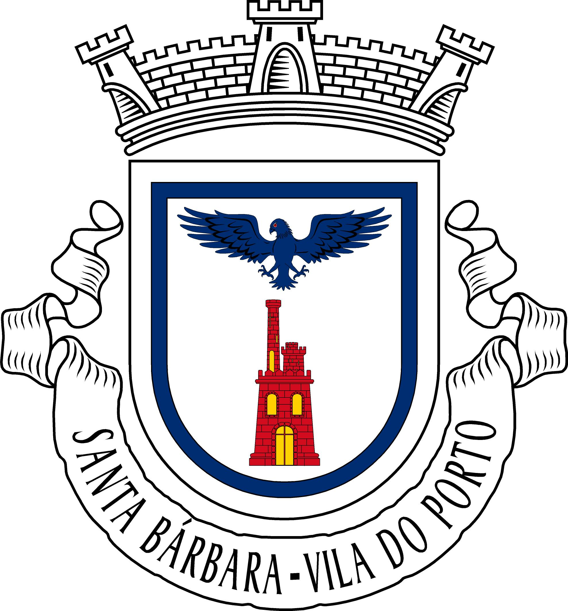 Brasão - Santa Bárbara